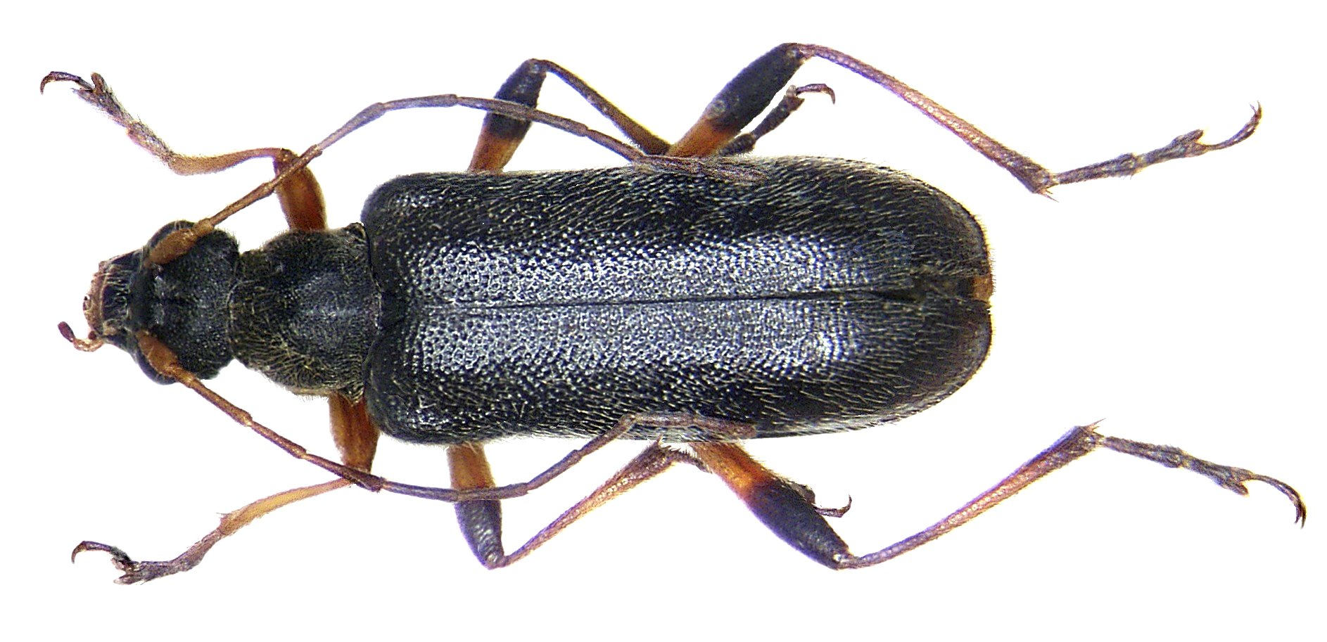 Familie: Cerambycidae Grösse: 8-11 mm Verbreitung: Europa Ökologie: Entwicklung in Kiefernholz Fundort: Austria, Burgenland, Forchtenau leg.det. U.Schmidt, 1975 Foto: U.Schmidt, 2005